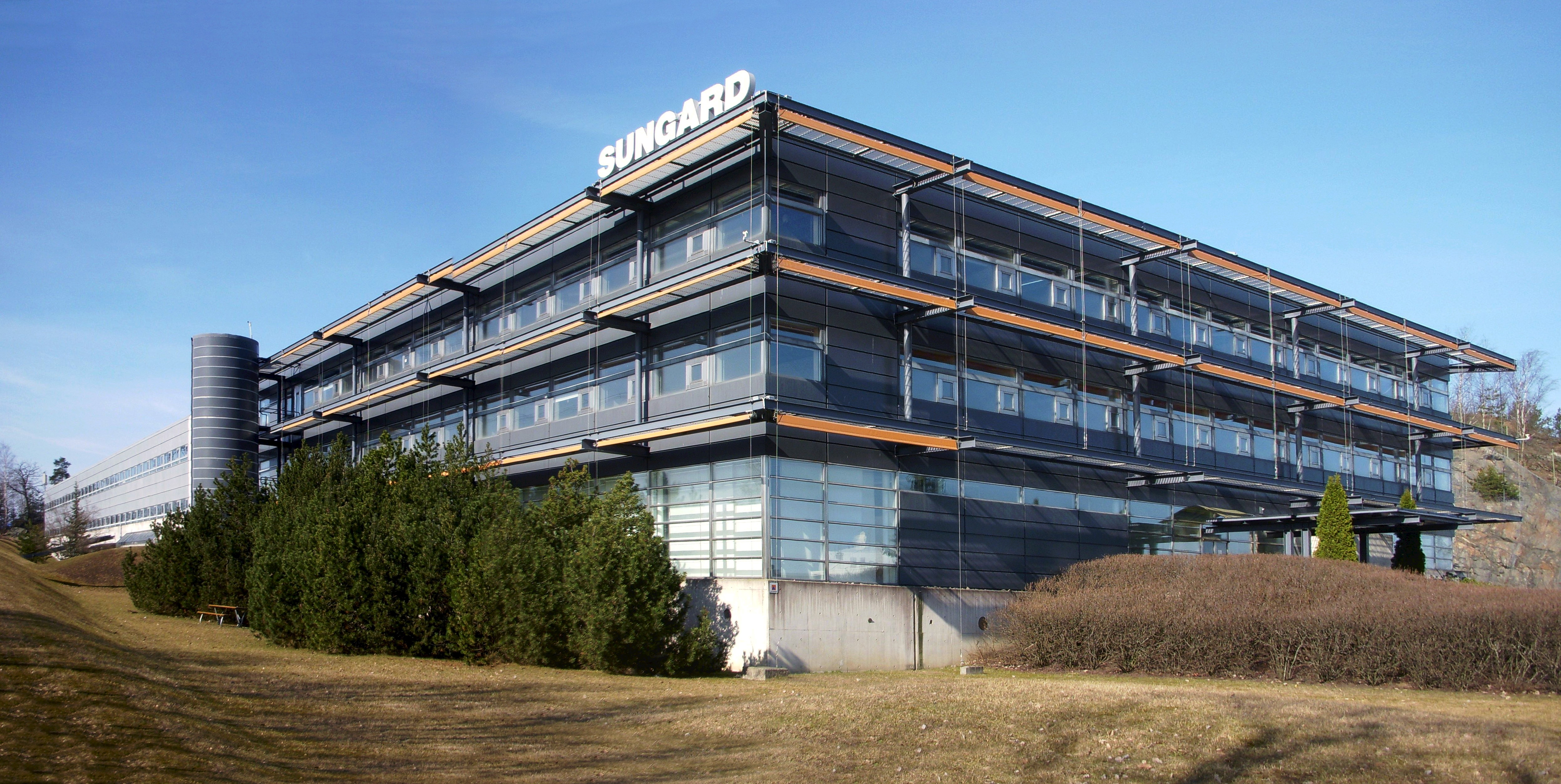 Canonhuset i Sätra, Stockholm (gamla Canonhuset)